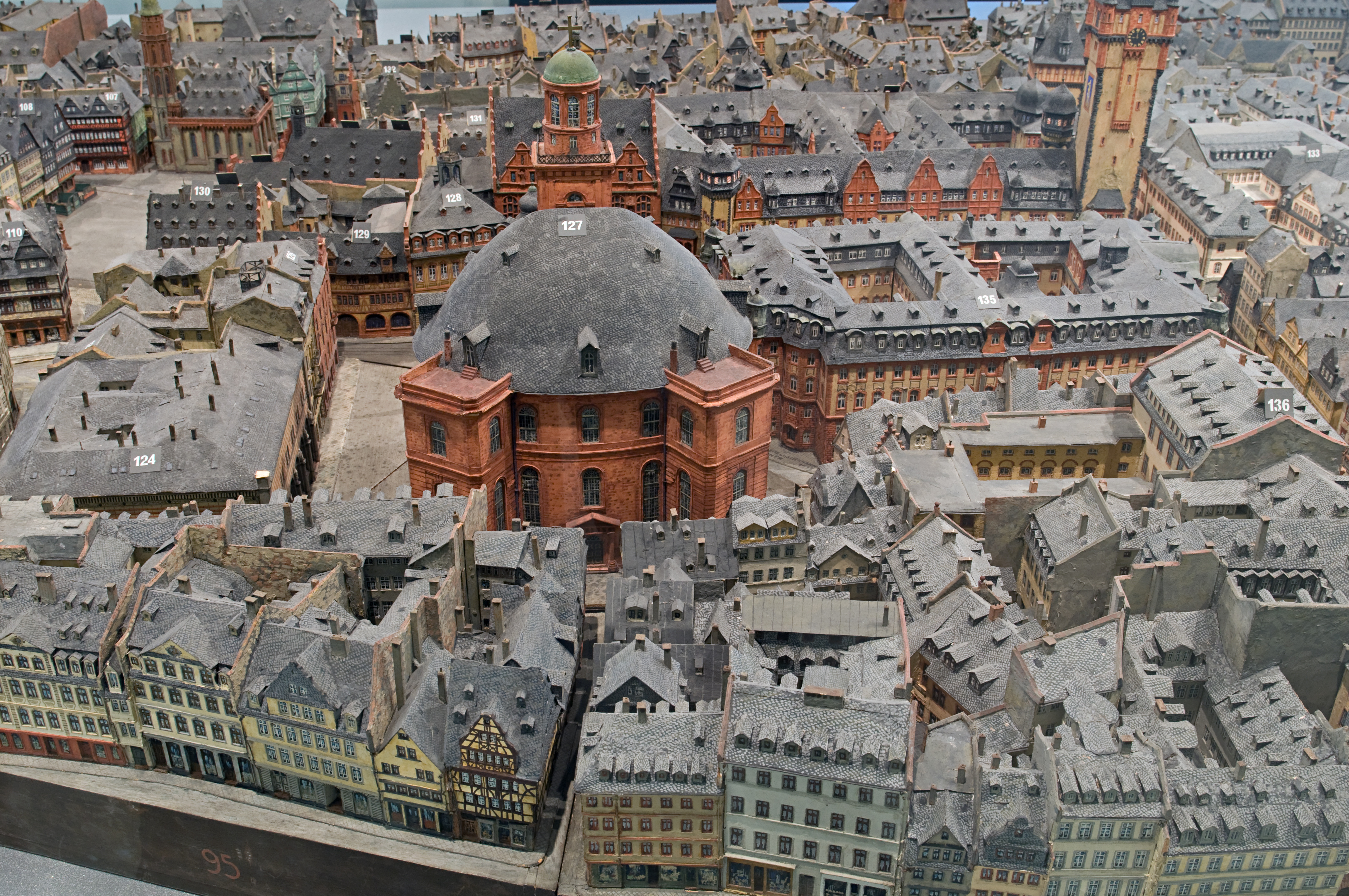 Historisches Museum Frankfurt am Main Altstadtmodell der Brüder Treuner Paulskirche